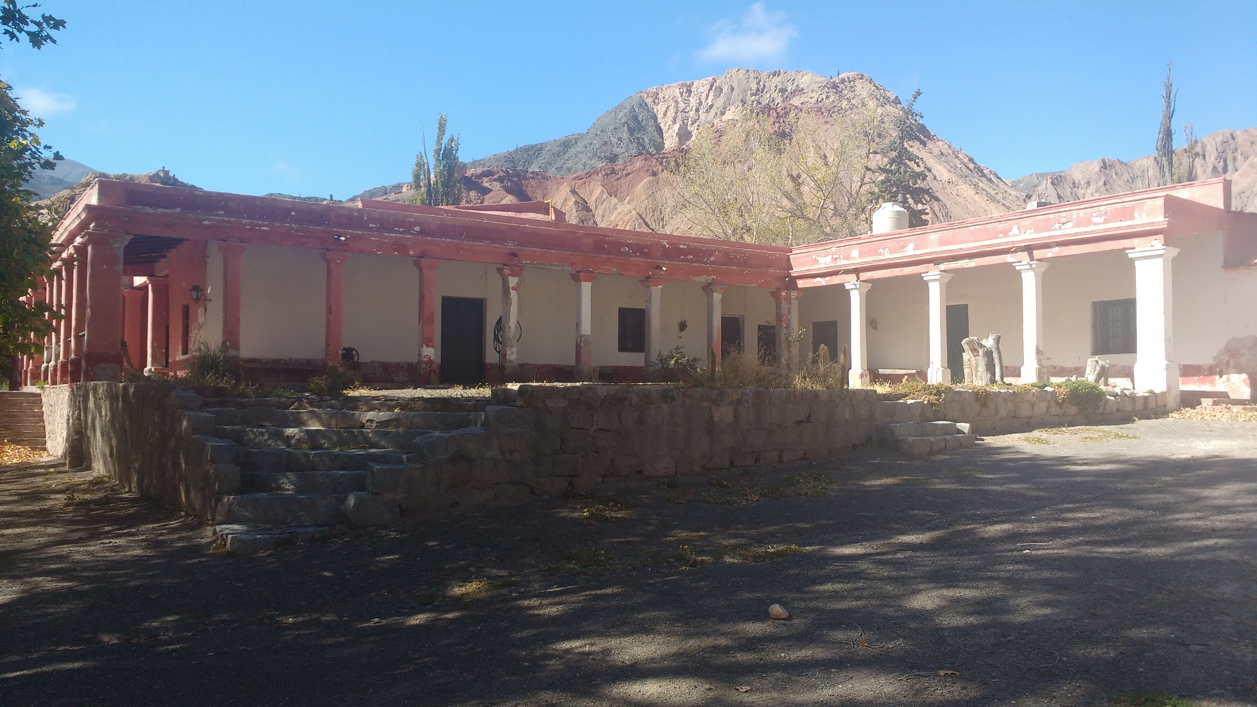 monumento cultural. lugares